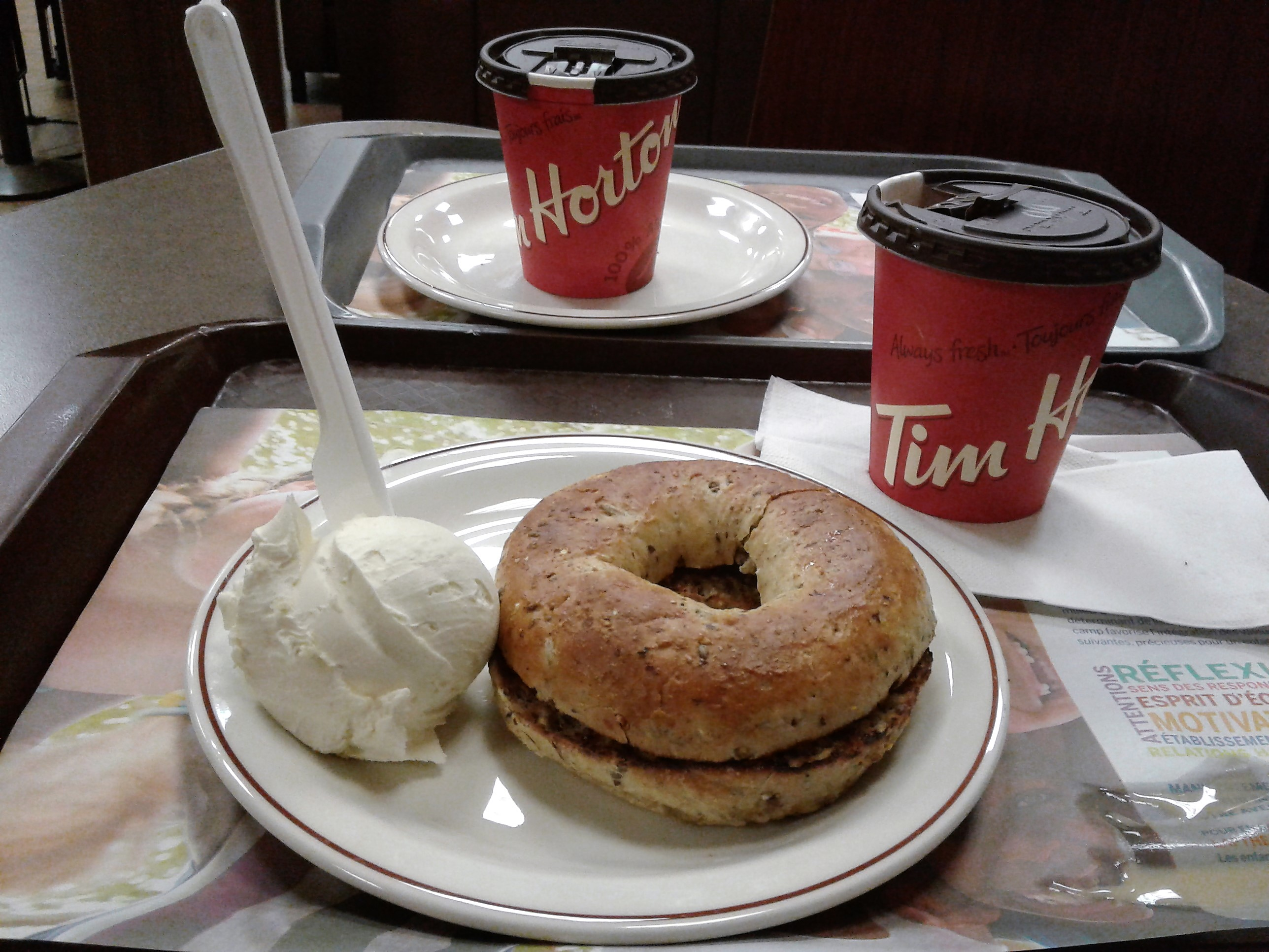 Bagel 12 grains et fromage à la crème Restaurant Tim Hortons, 8481, boulevard Newman, LaSalle, Montréal